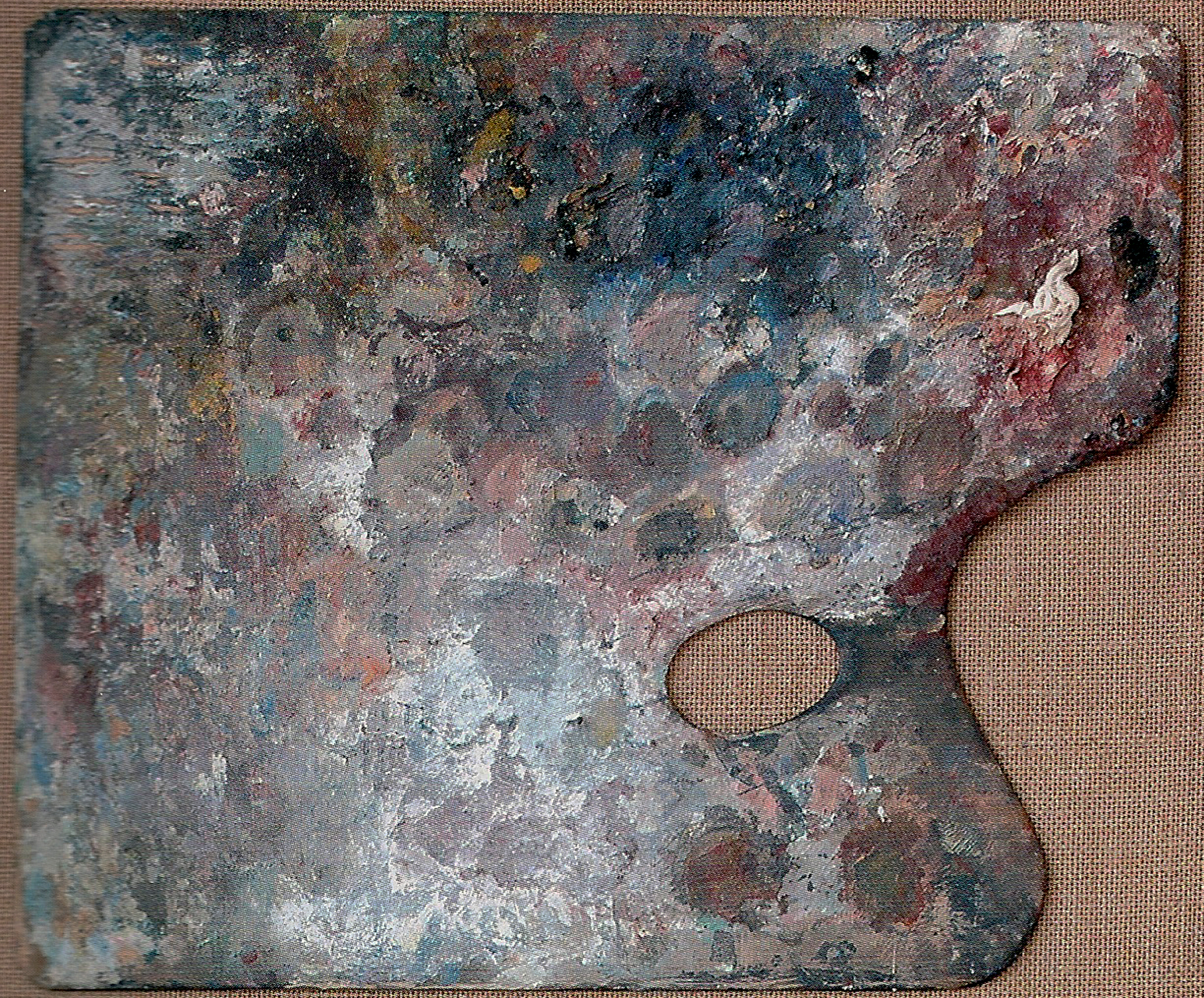 Paleta del pintor Guillermo Silveira. Guillermo Silveira García (1922–1987) DescriptionpainterDate of birth/death11 January 192211 May 1987Location of birth/deathSegura de LeónBadajozWork period1950-1987Work locationBadajozAuthority control : Q5888937